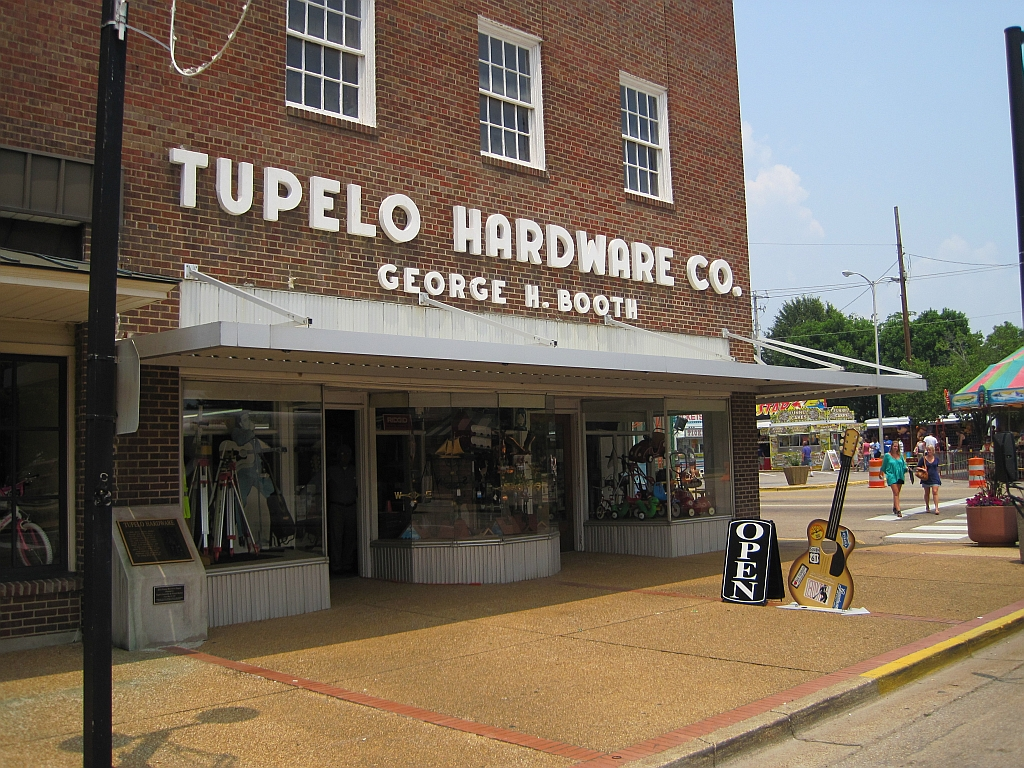 Tupelo Elvis Festival 2011 Tupelo Hardware Co.